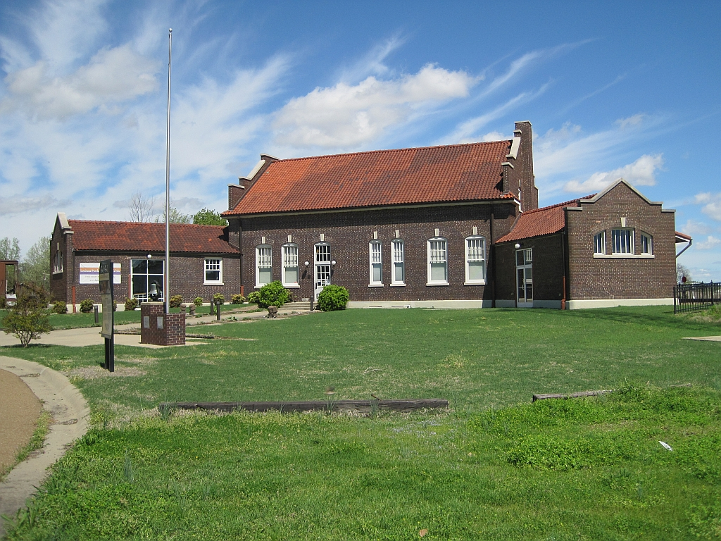 Central Delta Depot Museum (Brinkley, Arkansas)